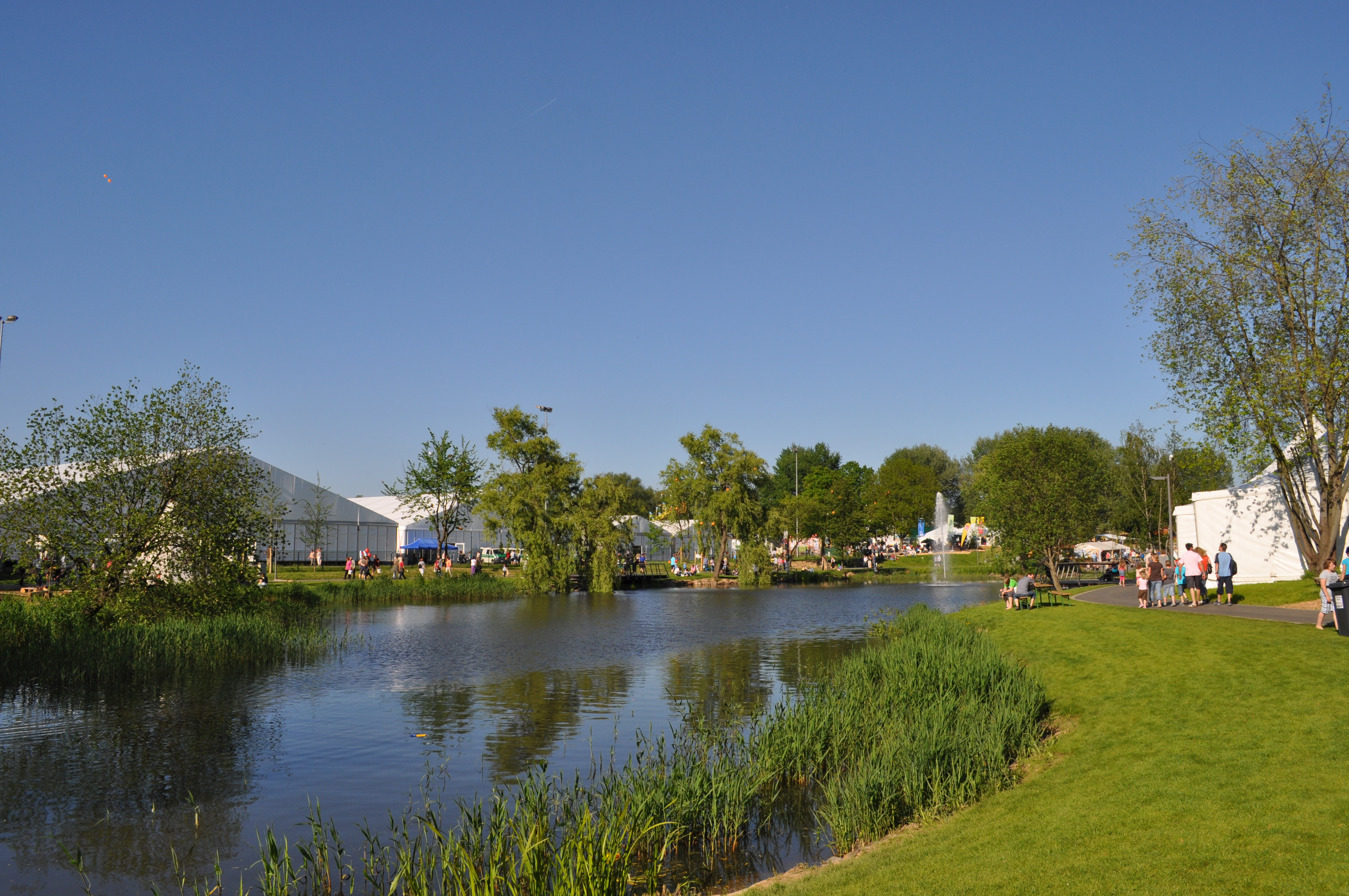 Hessentag 2010 in Stadtallendorf. Das Bild zeigt den Blick über den Teich auf das Festgelände am Heinz-Lang Park